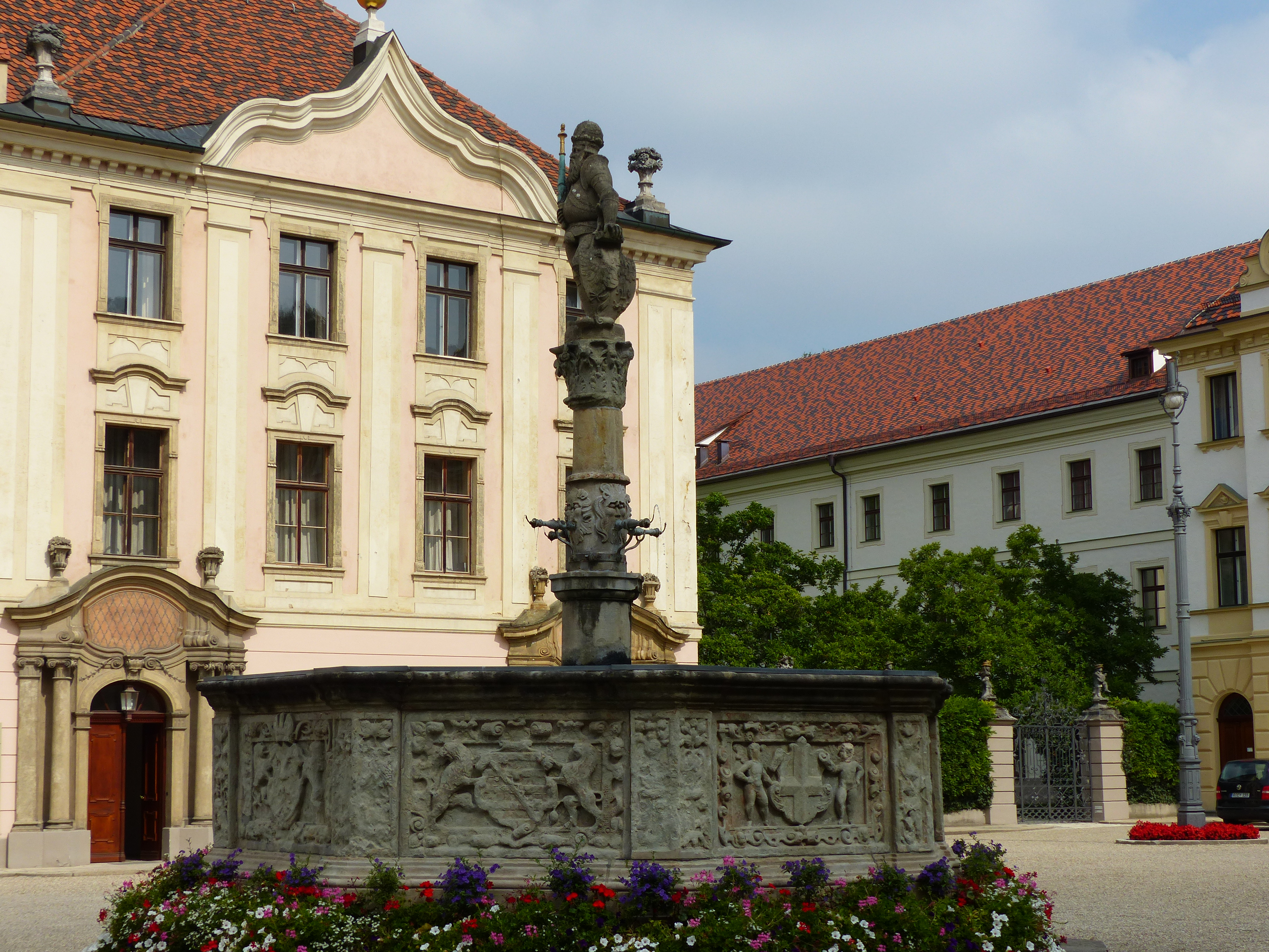 Schloss St. Emmeram von Thurn und Taxis in RegensburgThis is a photograph of an architectural monument.